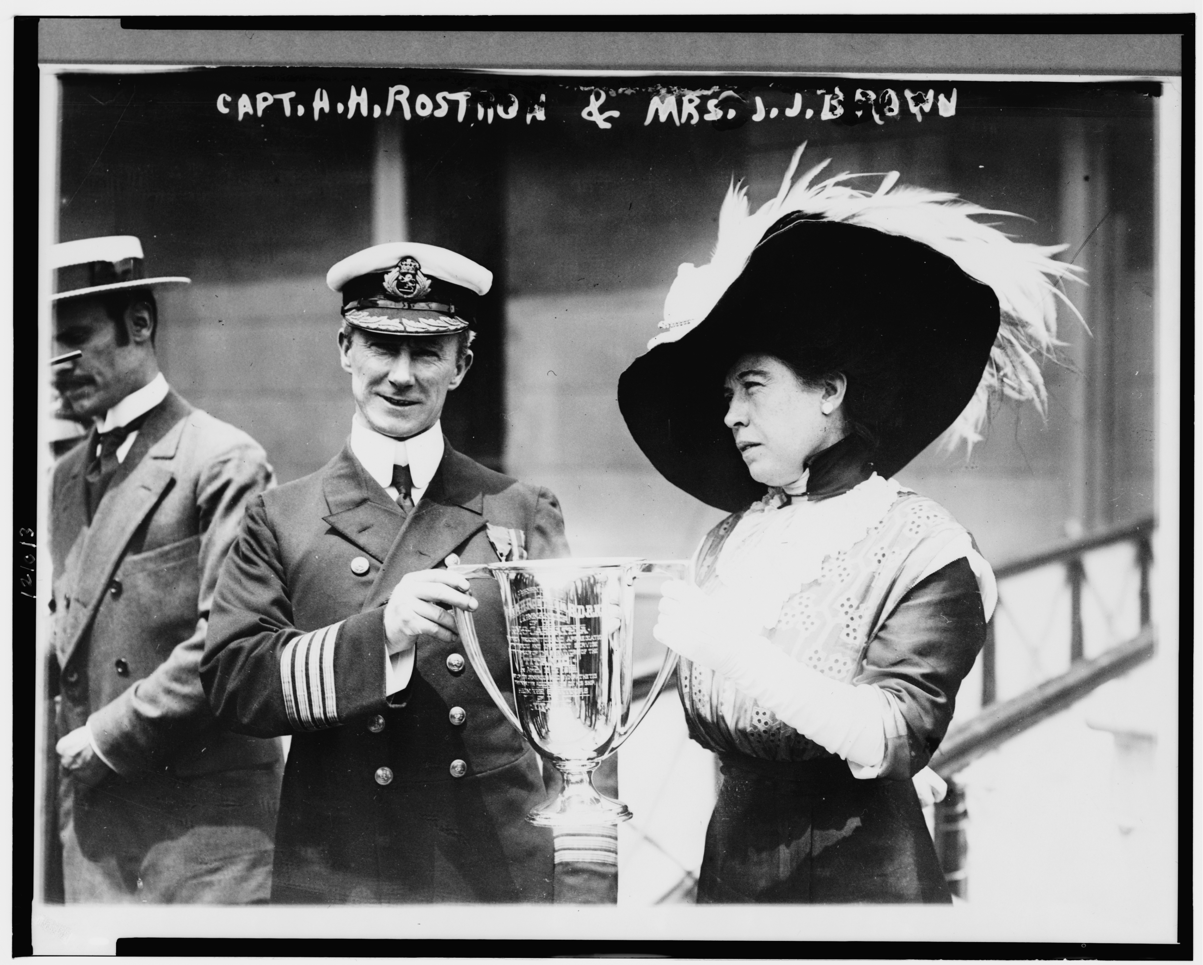 Margaret Brown (derecha) dando un premio al Capitán Arthur Henry Rostron por su servicio durante el rescate del Titanic.